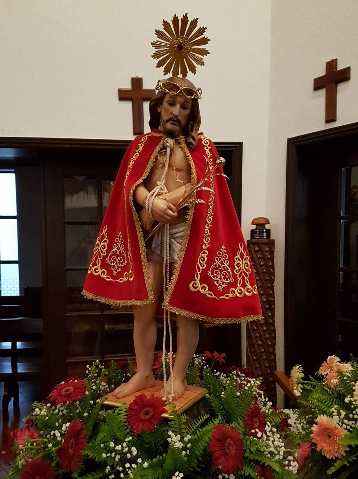 Imagem do Senhor Bom Jesus - aperfeiçoamentos.